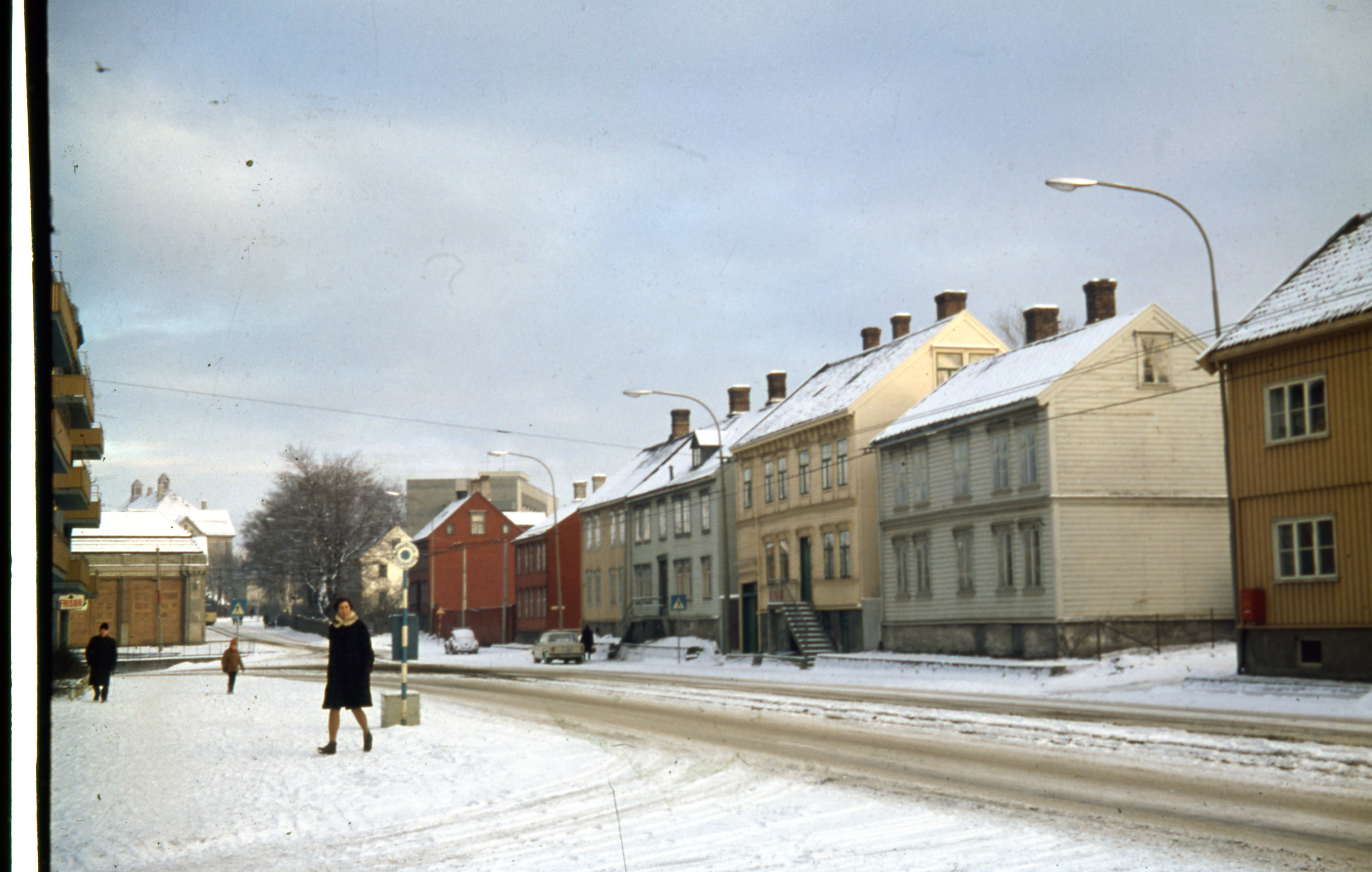 Format: Lysbilde i farge, positiv Dato / Date: ca. 1974 - 1990 Fotograf / Photographer: Henning Meyer (1946-2004) Sted / Place: Mellomveien, Trondheim Wikipedia: Lademoen Eier / Owner institution: Trondheim Byarkiv, The Municipal Archives of Trondheim Arkivreferanse / Archive reference: Tor.H47.B48.F26629 Mellomveien går fra Innherredsveien til Thomas von Westens gate og er oppkalt 1915 etter beliggenheten mellom Strandveien og Innherredsveien. Veien var tidligere en del av Gamle Kirkevei, og navnet hadde lenge vært i uoffisiell bruk. Etter at omnibusselskapet 1893 åpnet sin første linje gjennom veien, ble den kalt Omnibussveien. Kilde: Terje Bratberg - Trondheim Byleksikon (Oslo 2008)